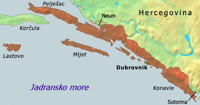 Karta Dubrovačke republike iz 1808.